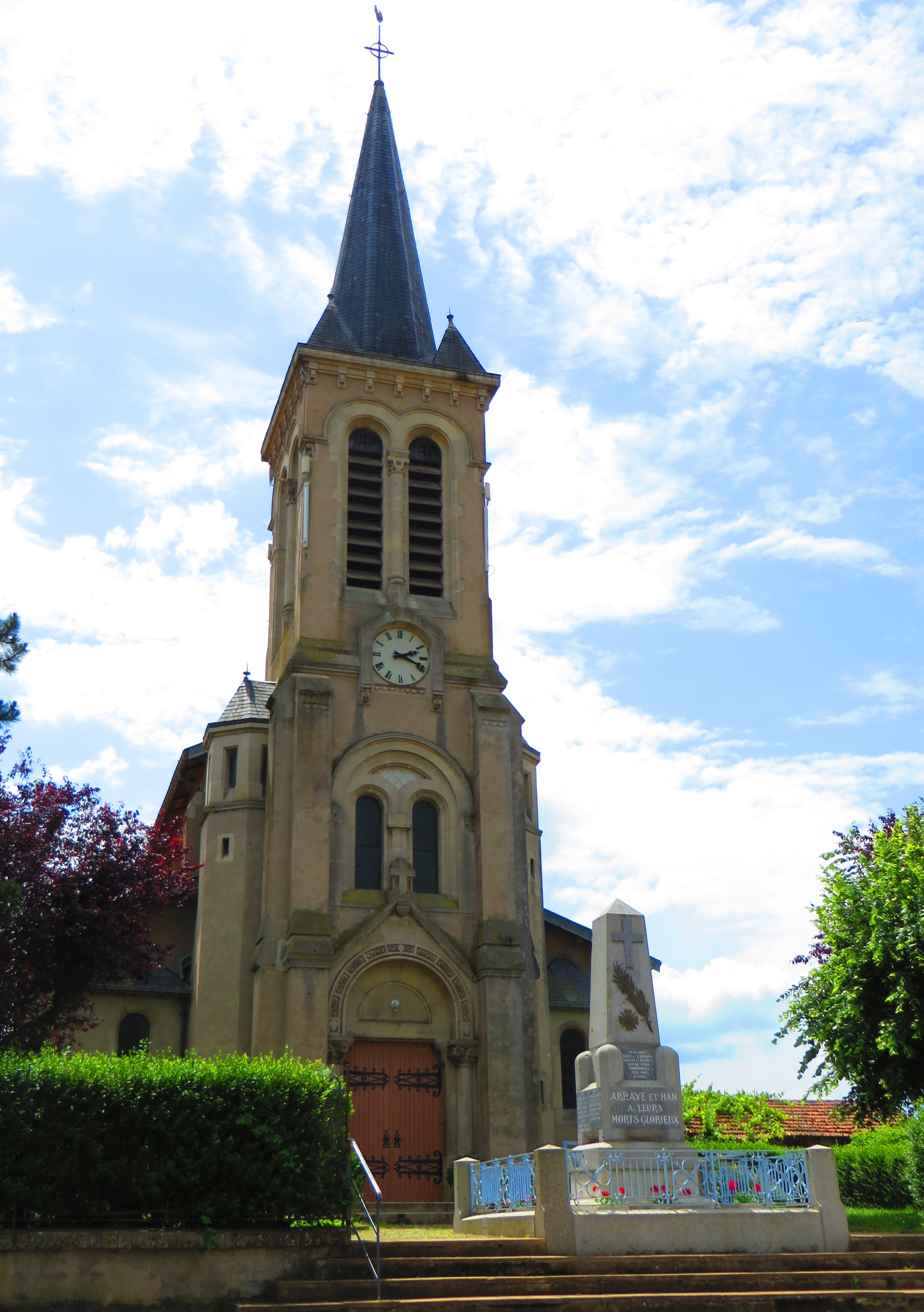 Arraye Église Saint-Étienne